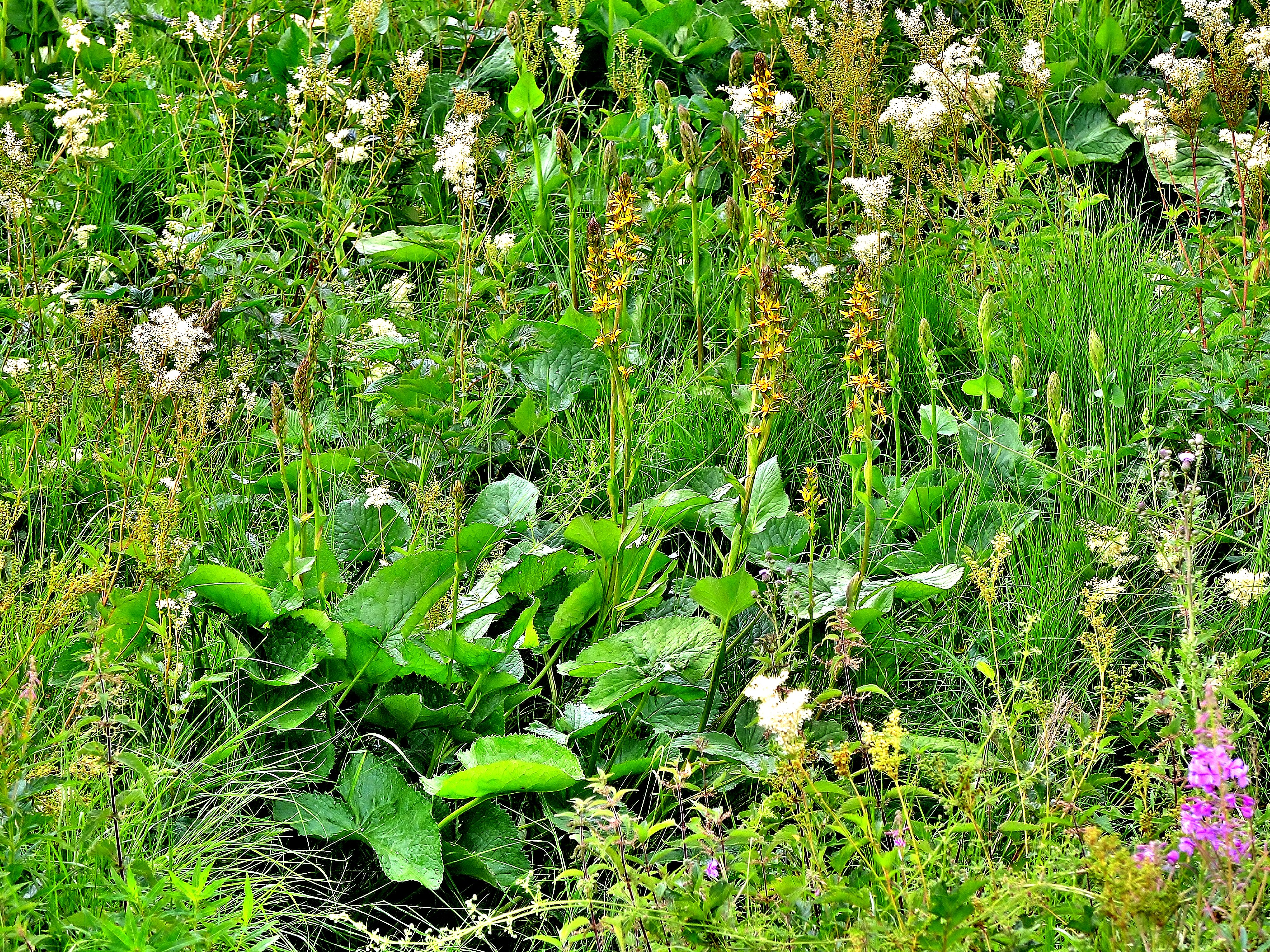 Ligularia sibirica dans la narse d'Espinasse. Saulzet-le-Froid. Puy-de-Dôme